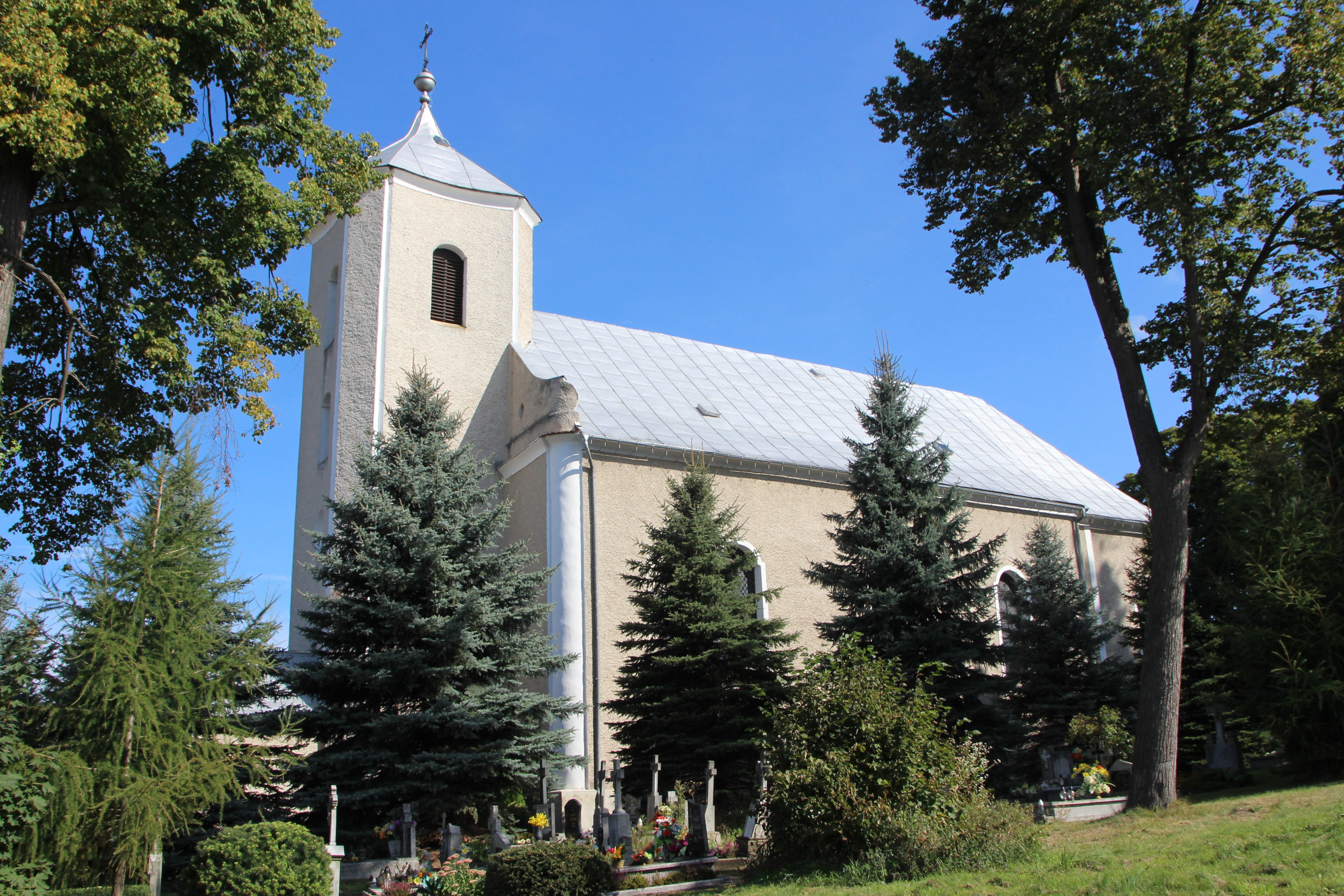 Szklary - rzymskokatolicki kościół parafialny p.w. św. Michała Archanioła, 1752-1765